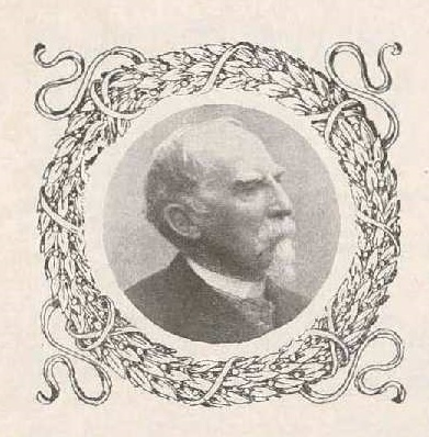 José Gómez de Arteche, Álbum de "Blanco y Negro". Españoles ilustres de principios del siglo XX, Madrid, 1904. Biblioteca Nacional de España